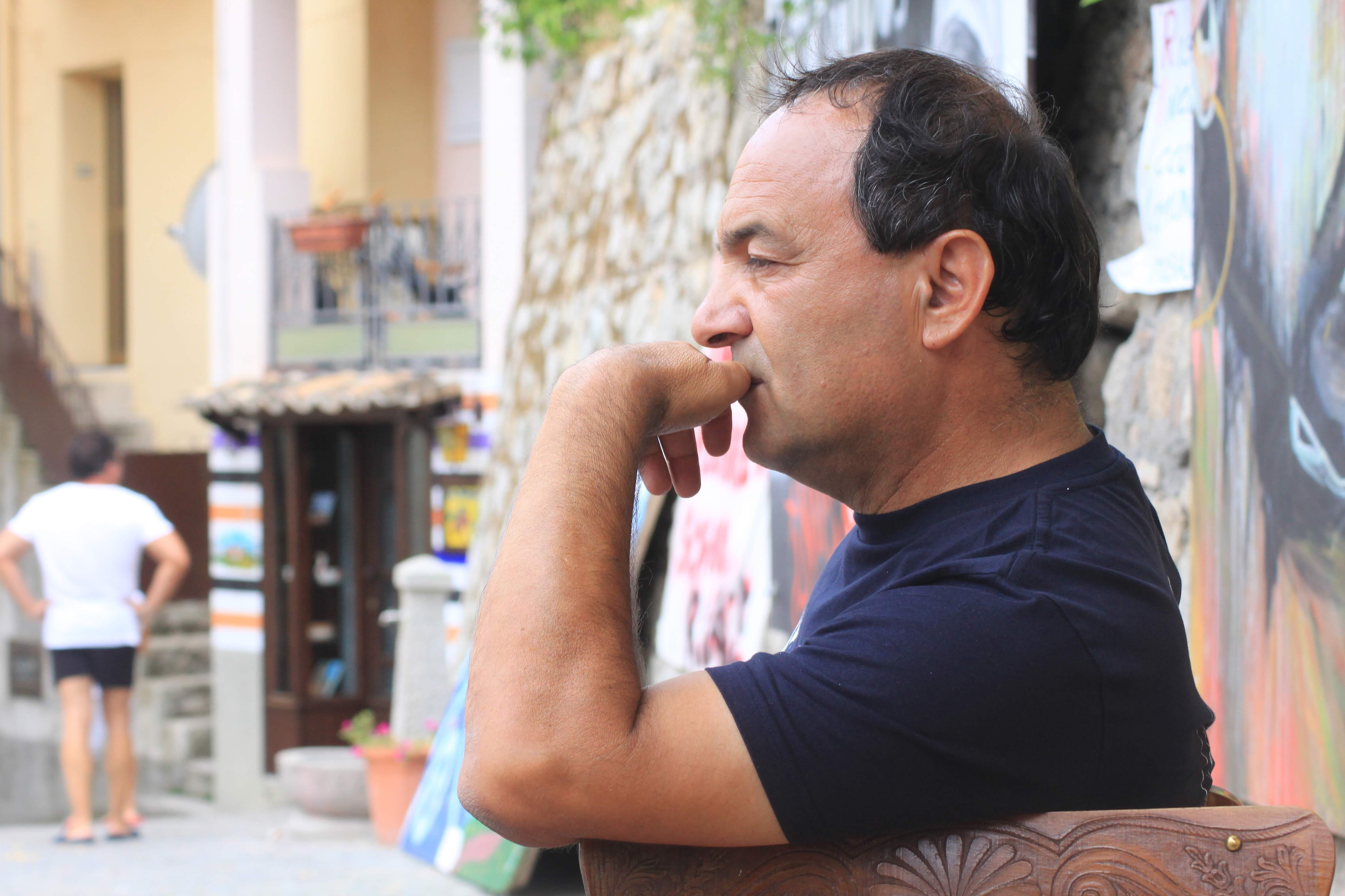 Domenico (Mimmo) Lucano in un momento di riflessione nella piazzetta di Riace